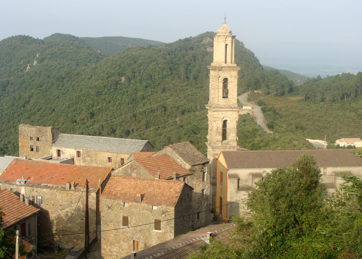 Lugo-di-Nazza : vue du vieux village.